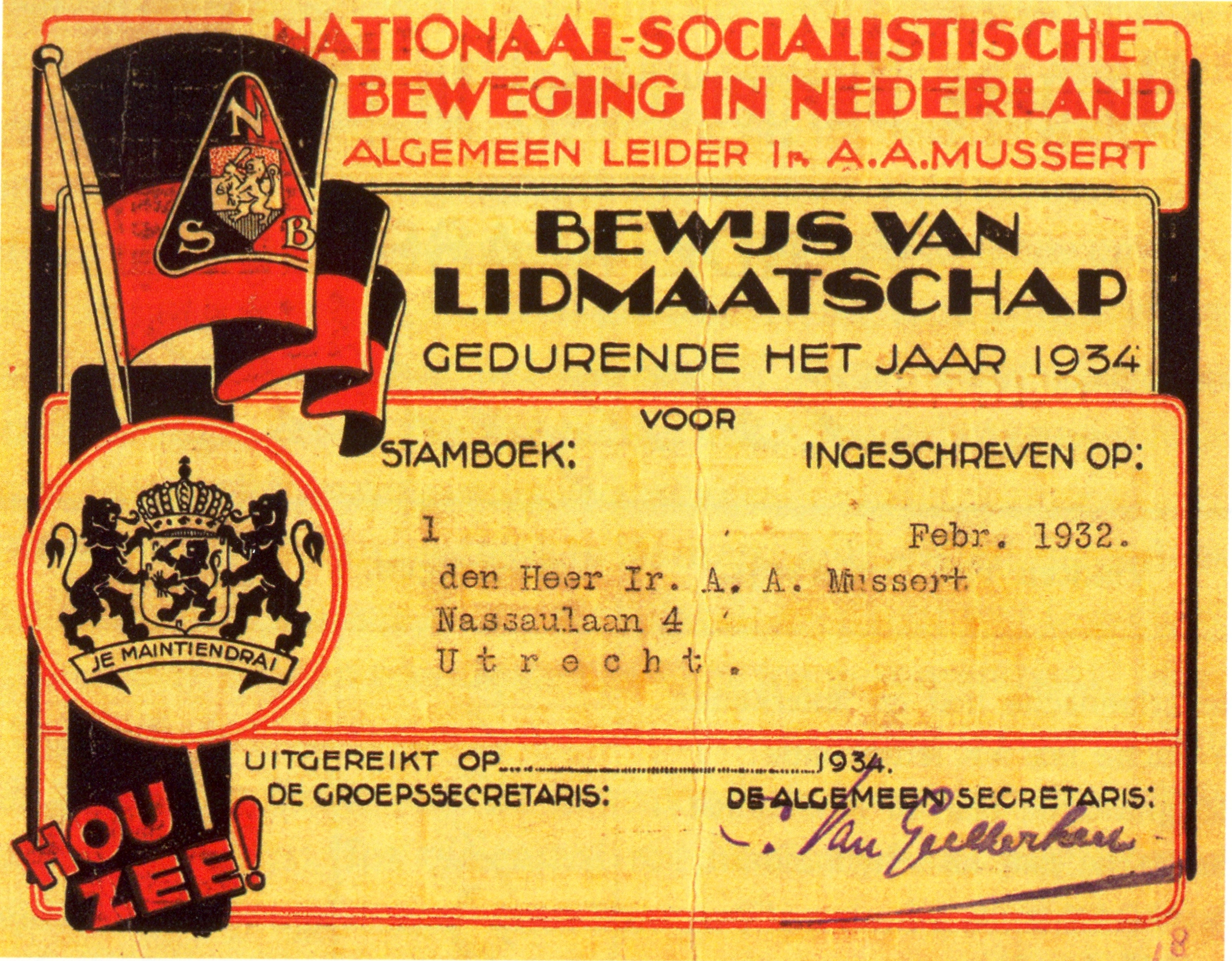 Lidmaatschapskaart NSB Anton Mussert, febr. 1932. Scan van afbeelding zelf gemaakt. Foto berust in het publieke domein, wegens de ouderdom ervan.